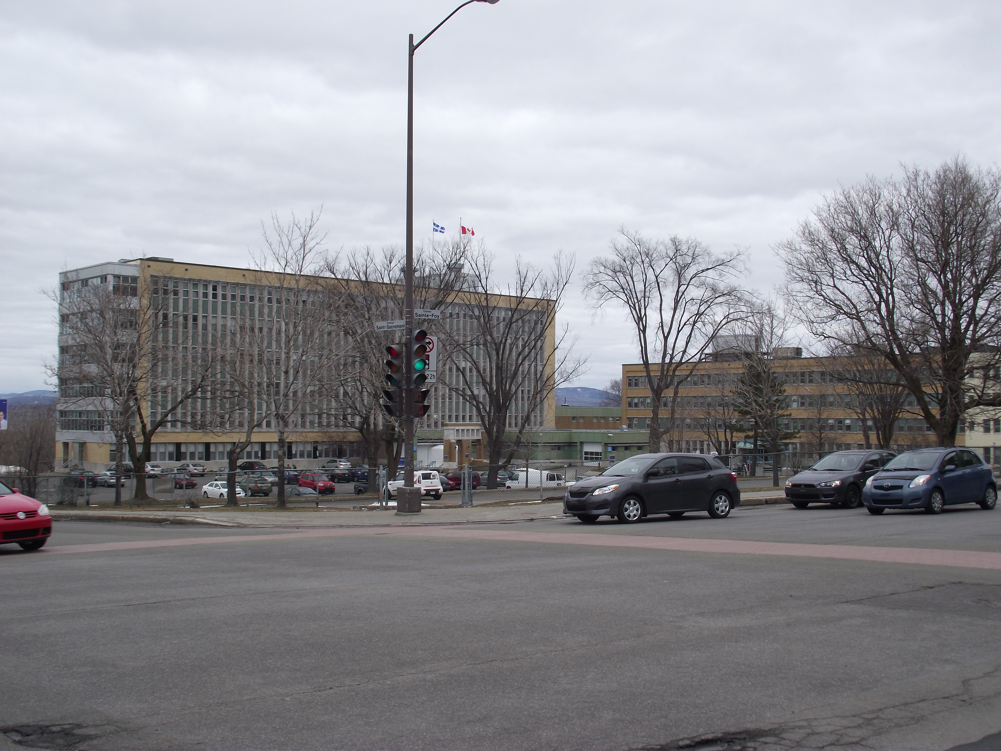 Hôpital Jeffery Hale